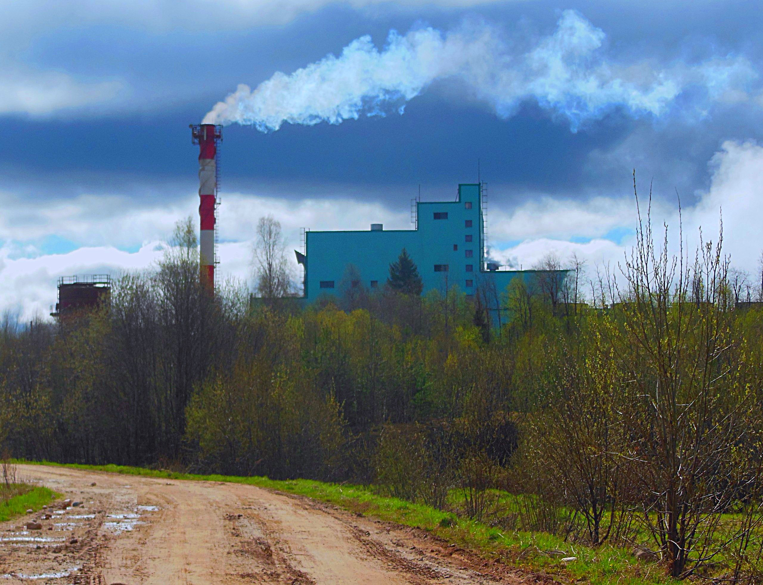 ТЭЦ Белый Ручей